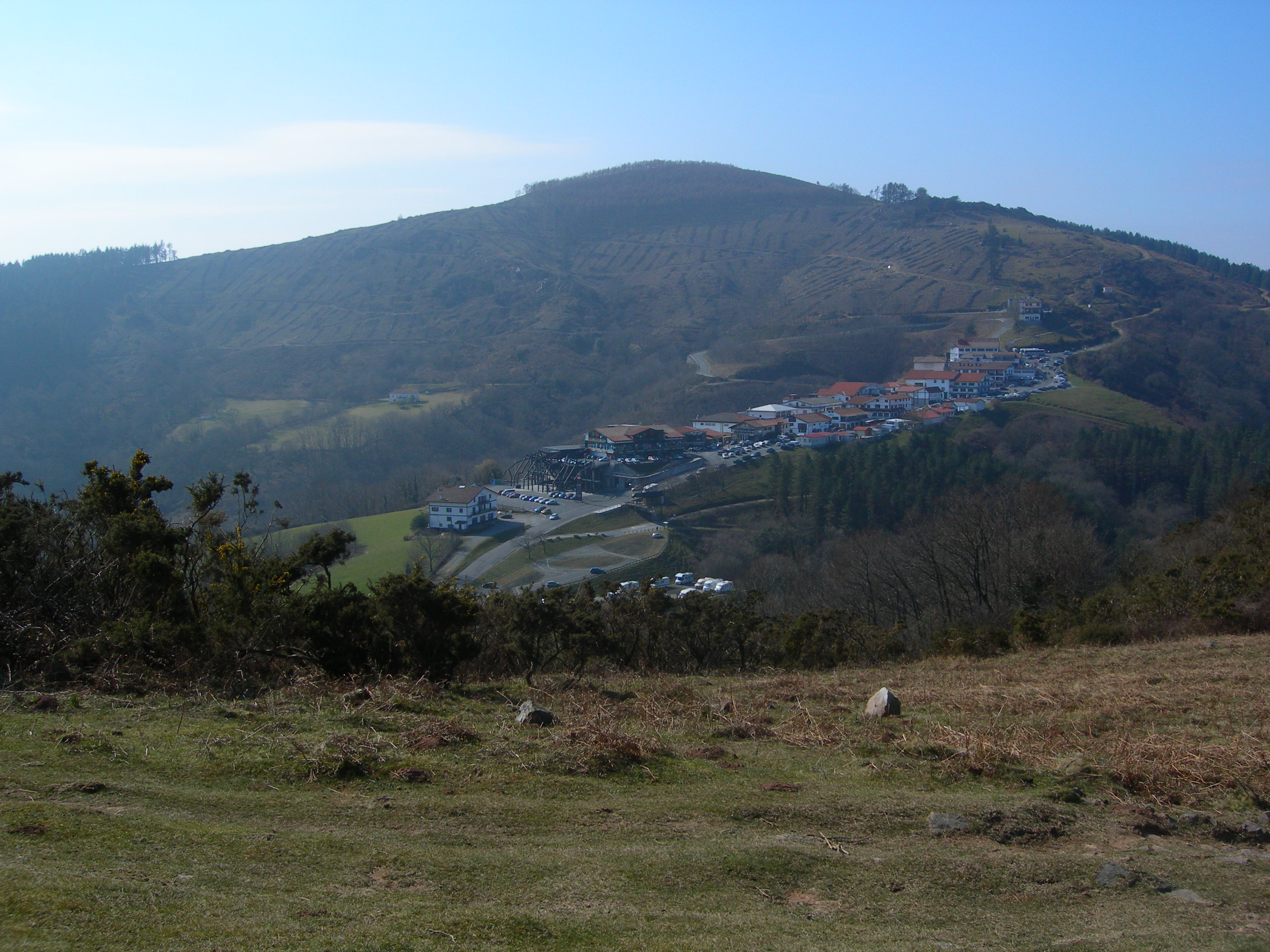 "Ventas" du col d'Ibardin (frontière entre l'Espagne et la France) vues depuis le GR10.